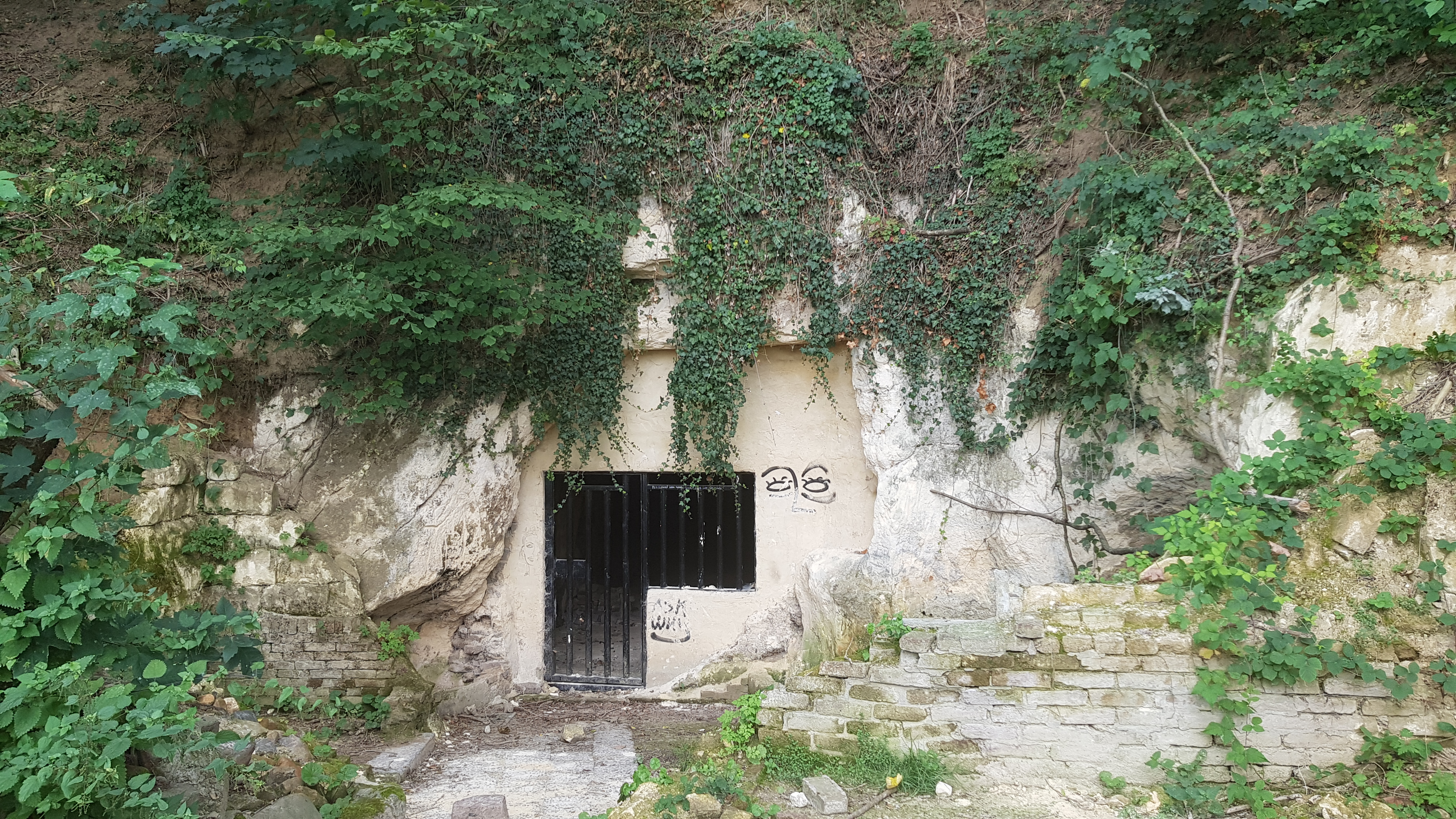 Grotwoning Greetje Blanckers, Maastricht, Nederland